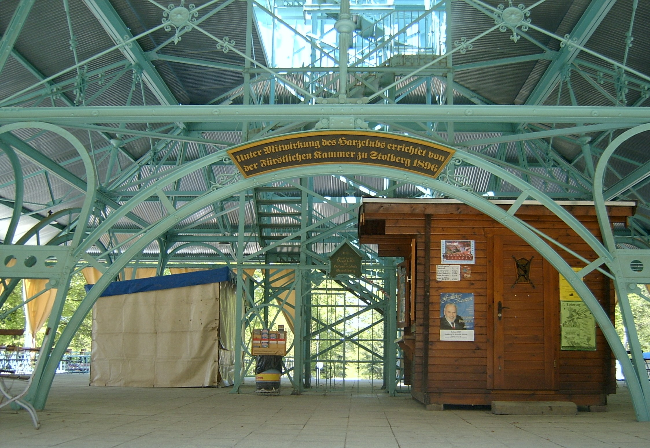 Eingang zum Josephskreuz.